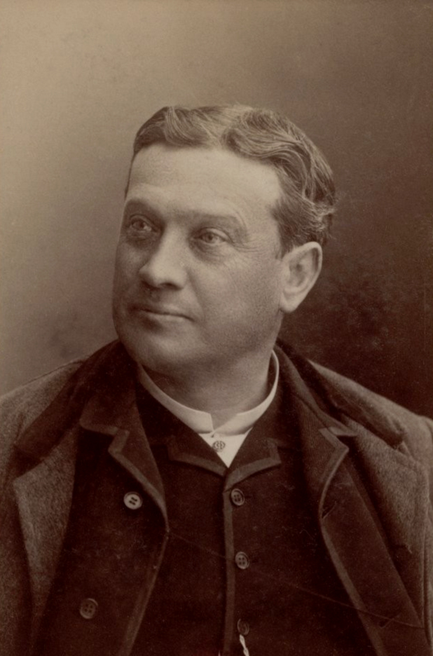 Pierre Grivot (1834-1912)